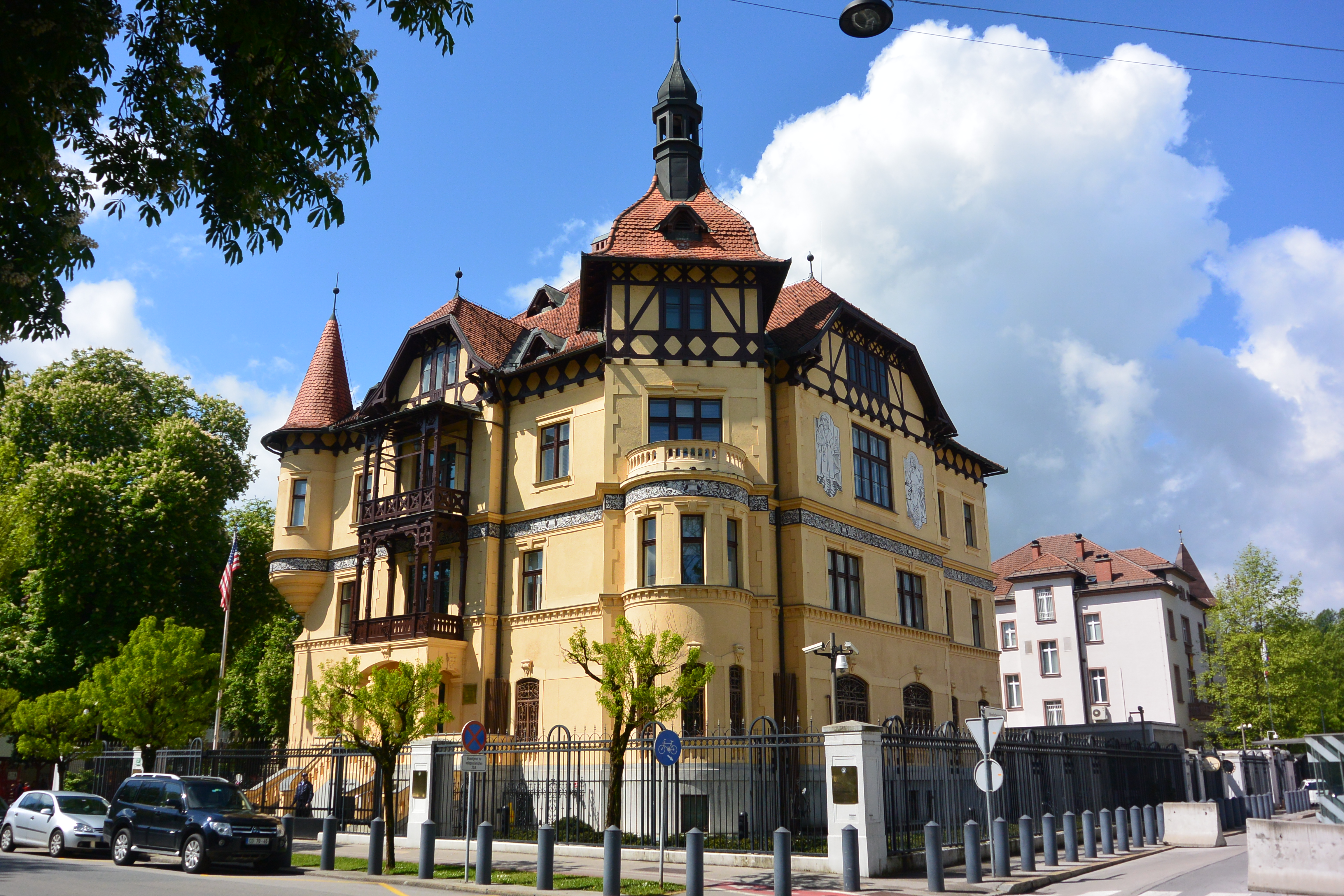 Laibach